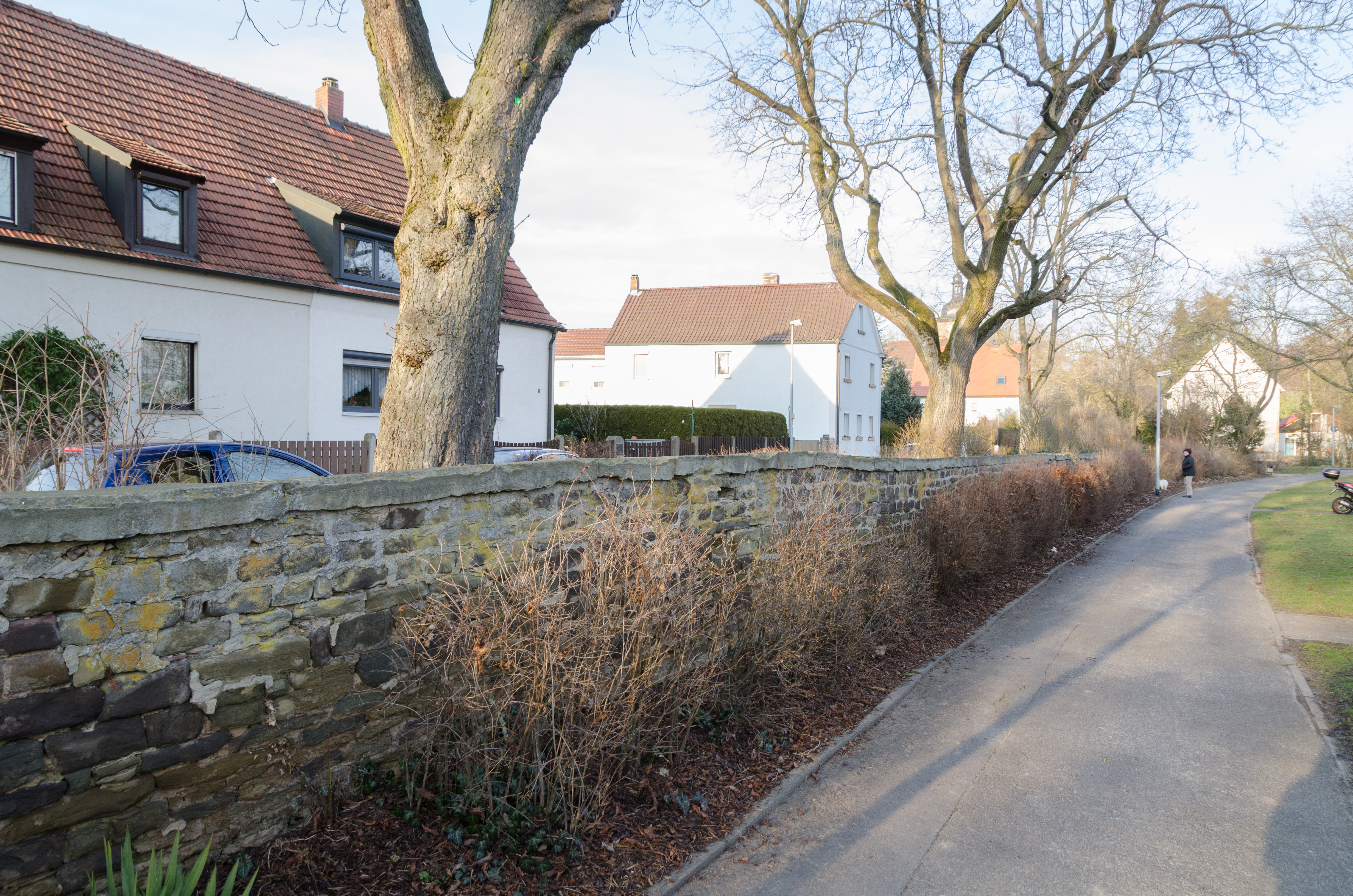 Schweinfurt Oberndorf, ehem. Ortsmauer